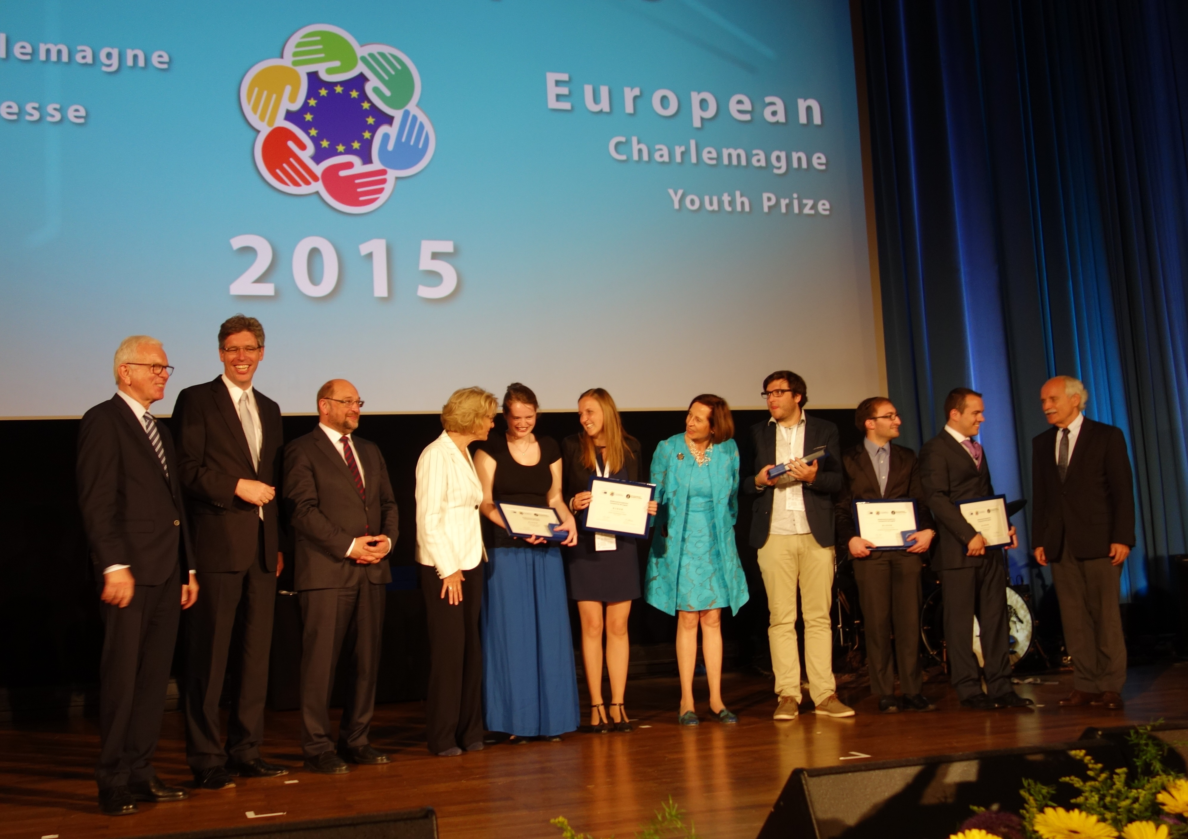 Verleihung Karlspreis der Jugend 2015 in der Aula der RWTH Aachen mit Preisträgern 1. bis 3. Preis und Laudatoren